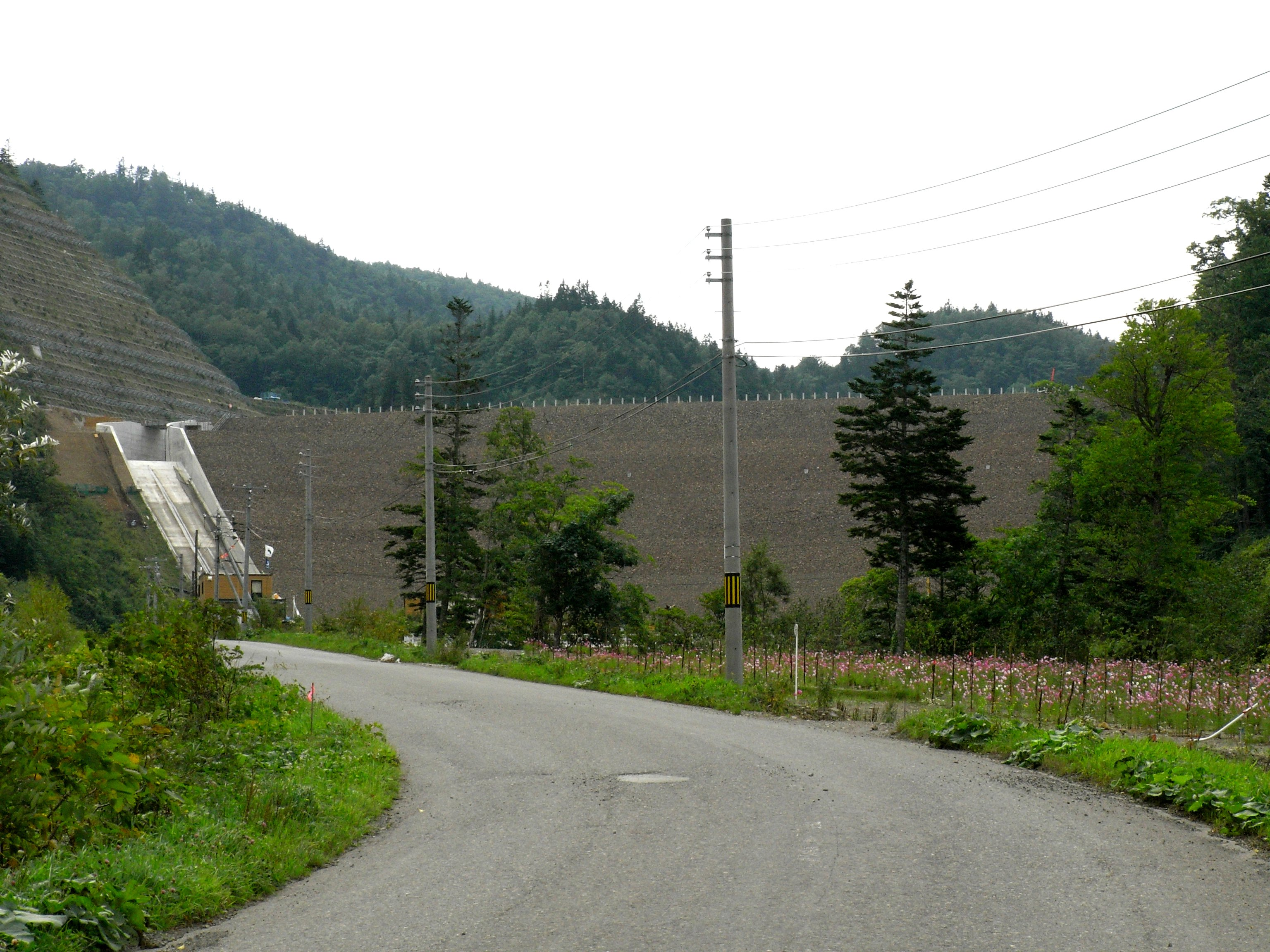 雄武ダム（北海道・イソサム川）